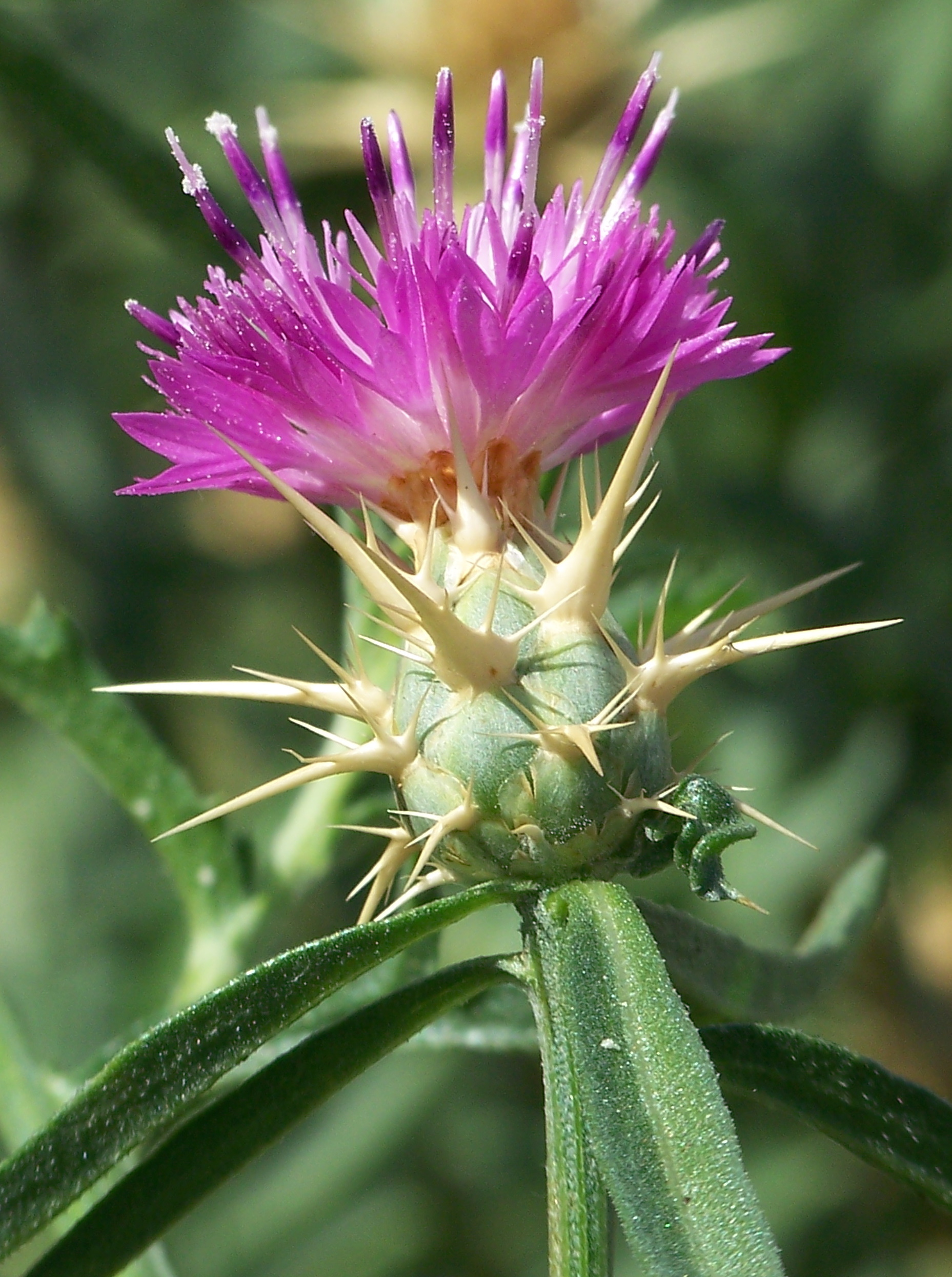 Centaurea calcitrapa - Ambiente suburbano; Madrid capital, ribera izquierda del Río Manzanares a la altura del Puente de los Franceses.